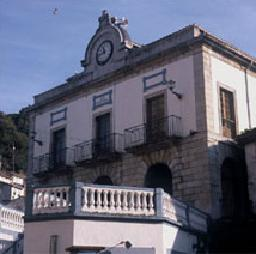 Ayuntamiento del concejo asturiano de Cudillero